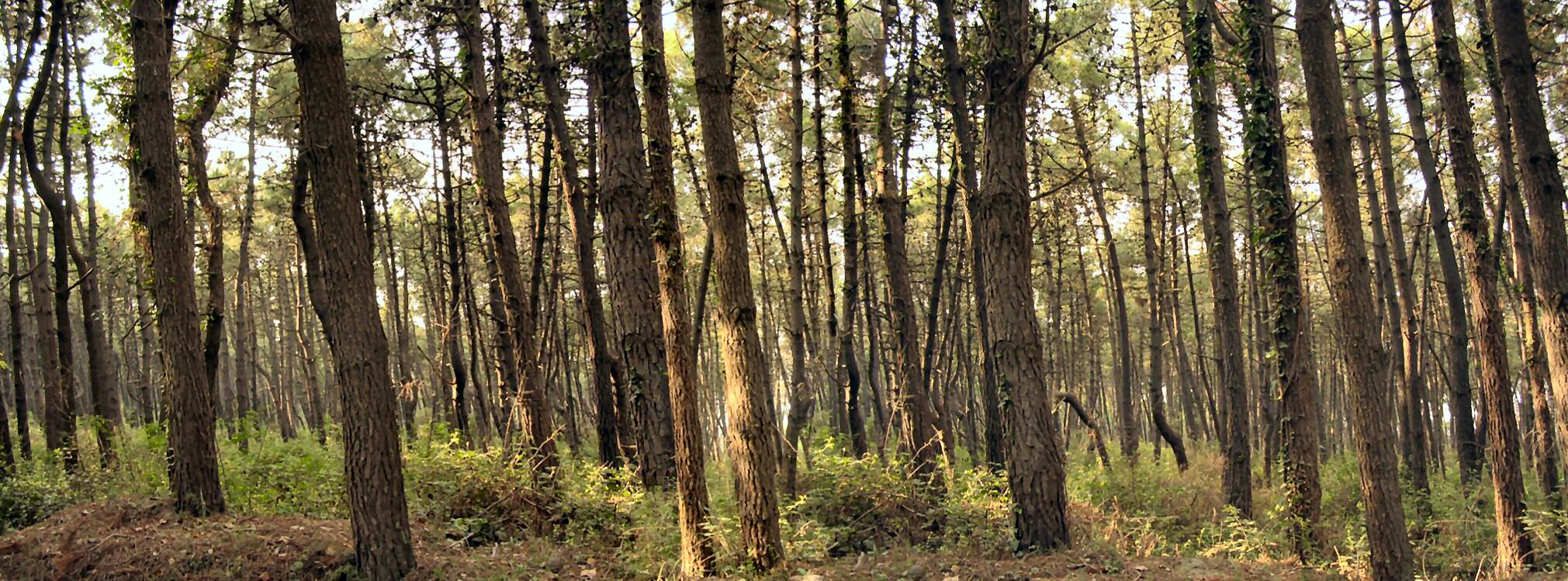 Bosco di pini marittimi - Foto di Paolo Carboni --L'uomo in ammollo ◄strizzami 22:04, Set 5, 2005 (CEST)